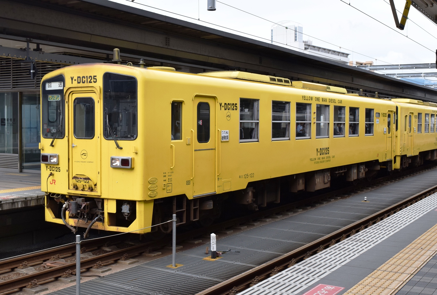 大分駅にて撮影